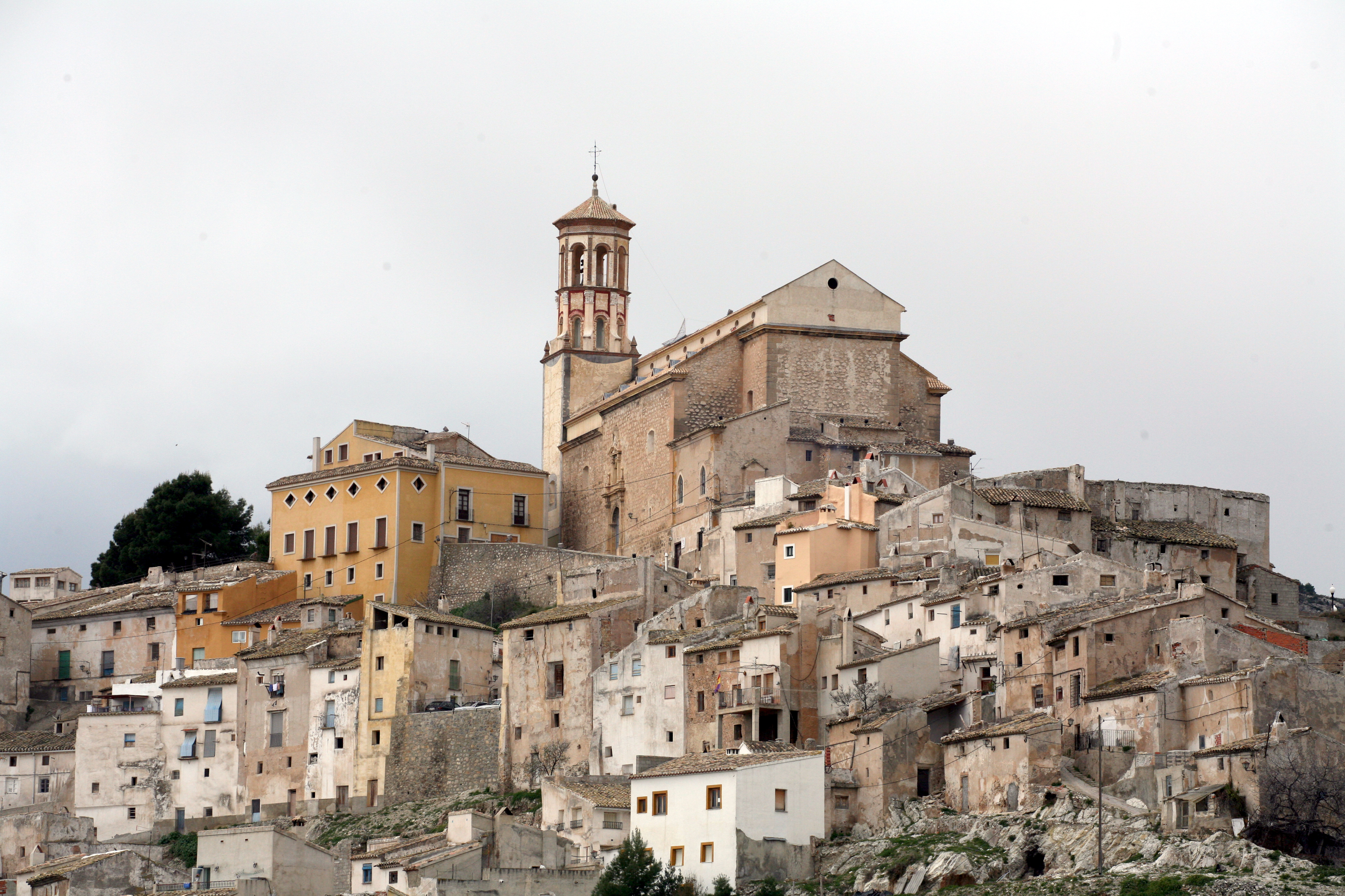 Aquí podemos apreciar el casco antiguo de cehegin, localidad situada en Murcia.